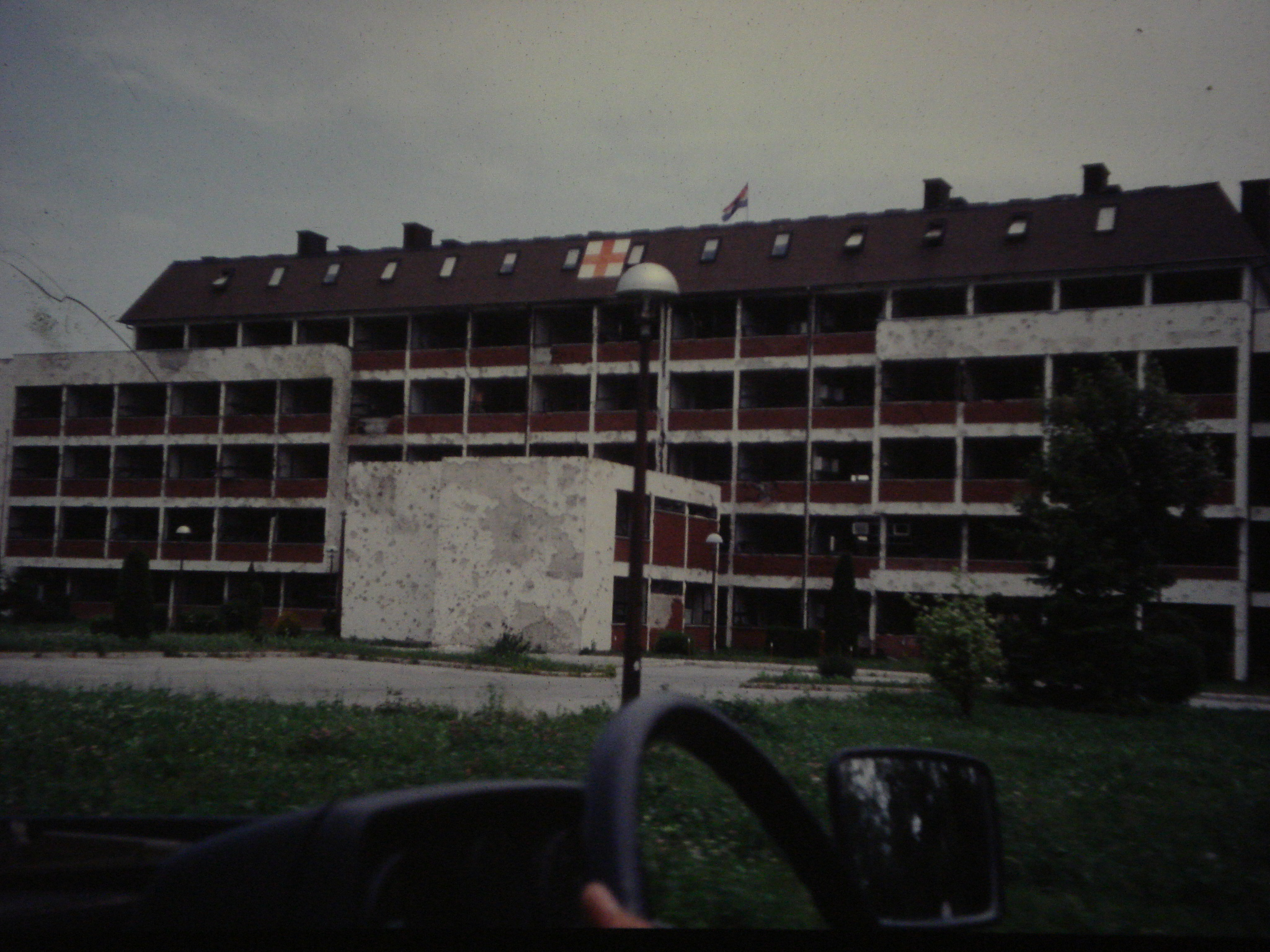 Hospital de Pakrac. Año 1994